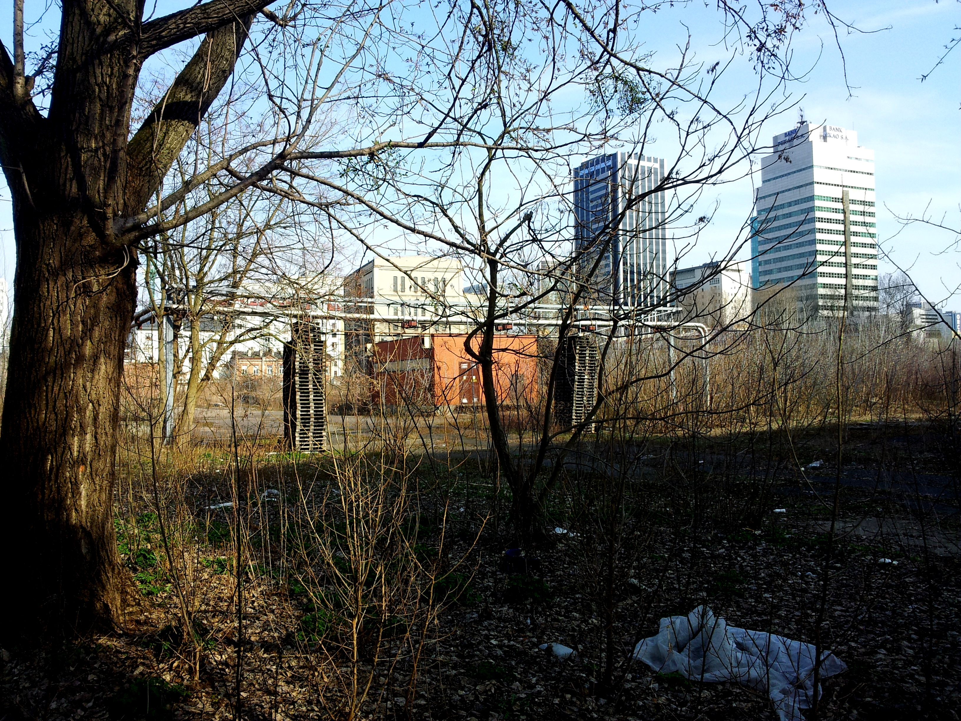 Betriebsgelaende der ehemaligen Haberbusch i Schiele-Brauerei in Warschau